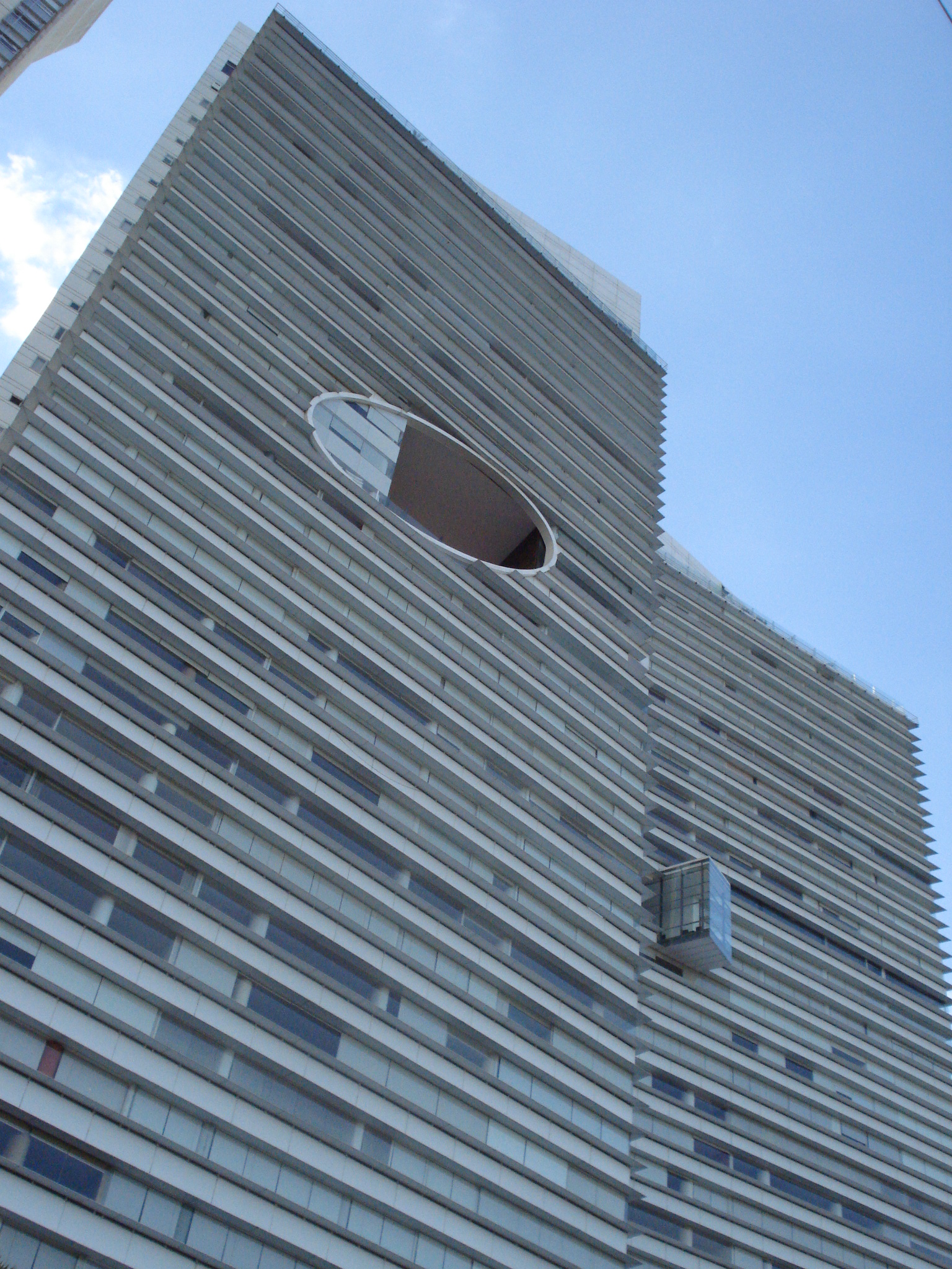 Torres Punta del Parque A y B, ubicadas en Santa Fe en la Ciudad de México